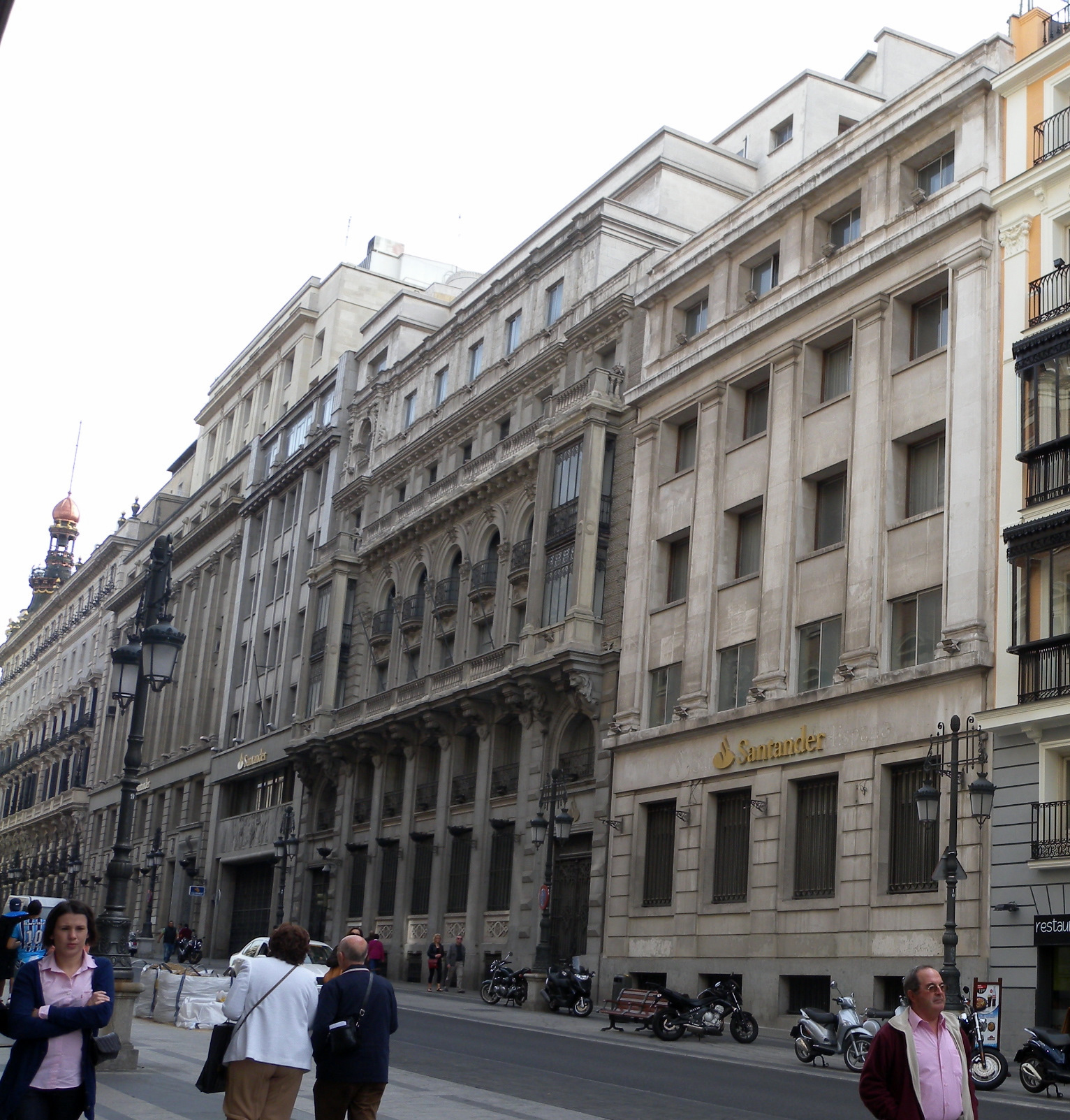 Calle Alcalá